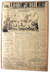 Portada del diario La Prensa de Salto, en ocasión en que uruguay se consagró por 4ta. vez Campeón Mundial de Futbol.